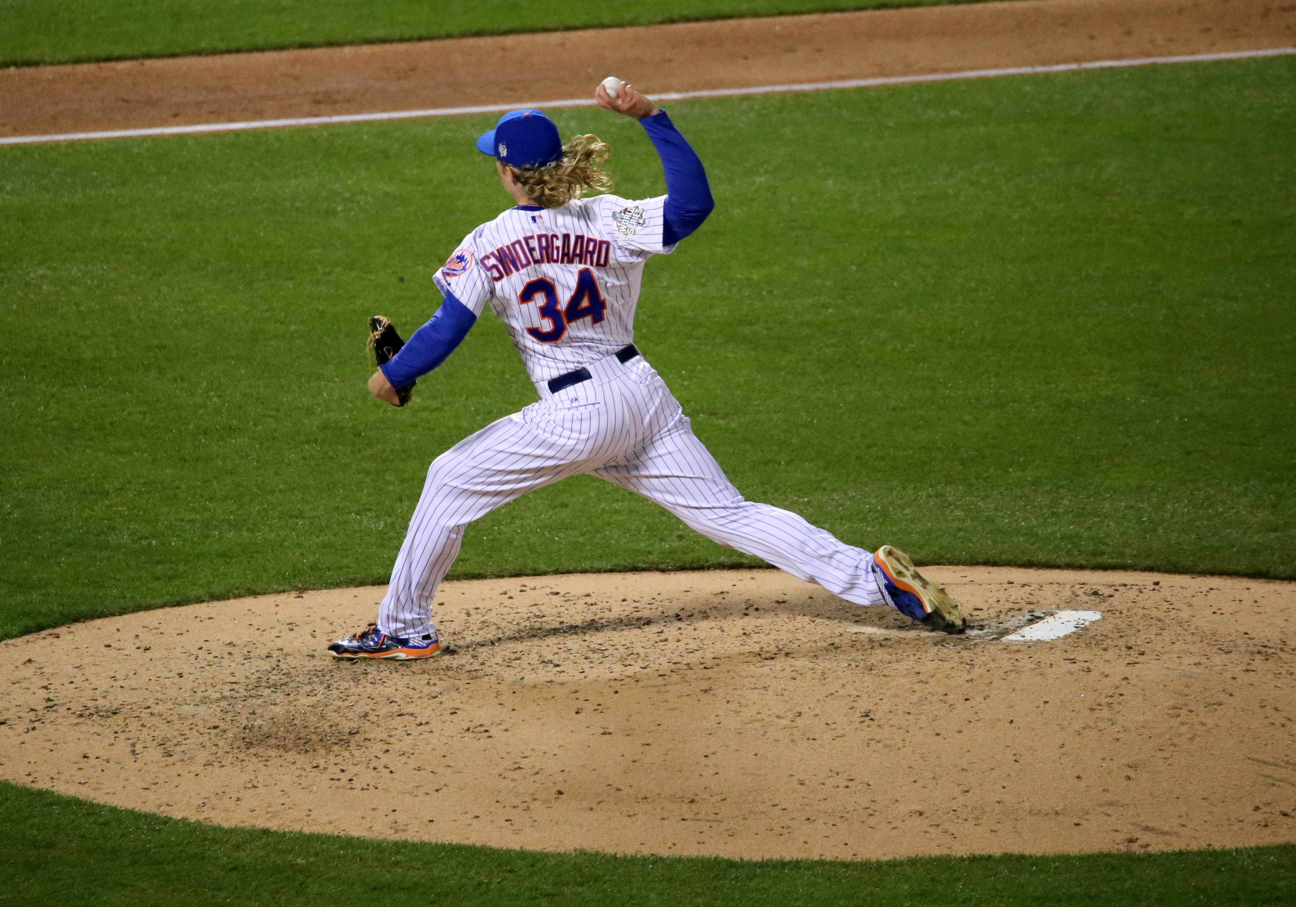 Noah Syndergaard delivers during #WorldSeries Game 3.